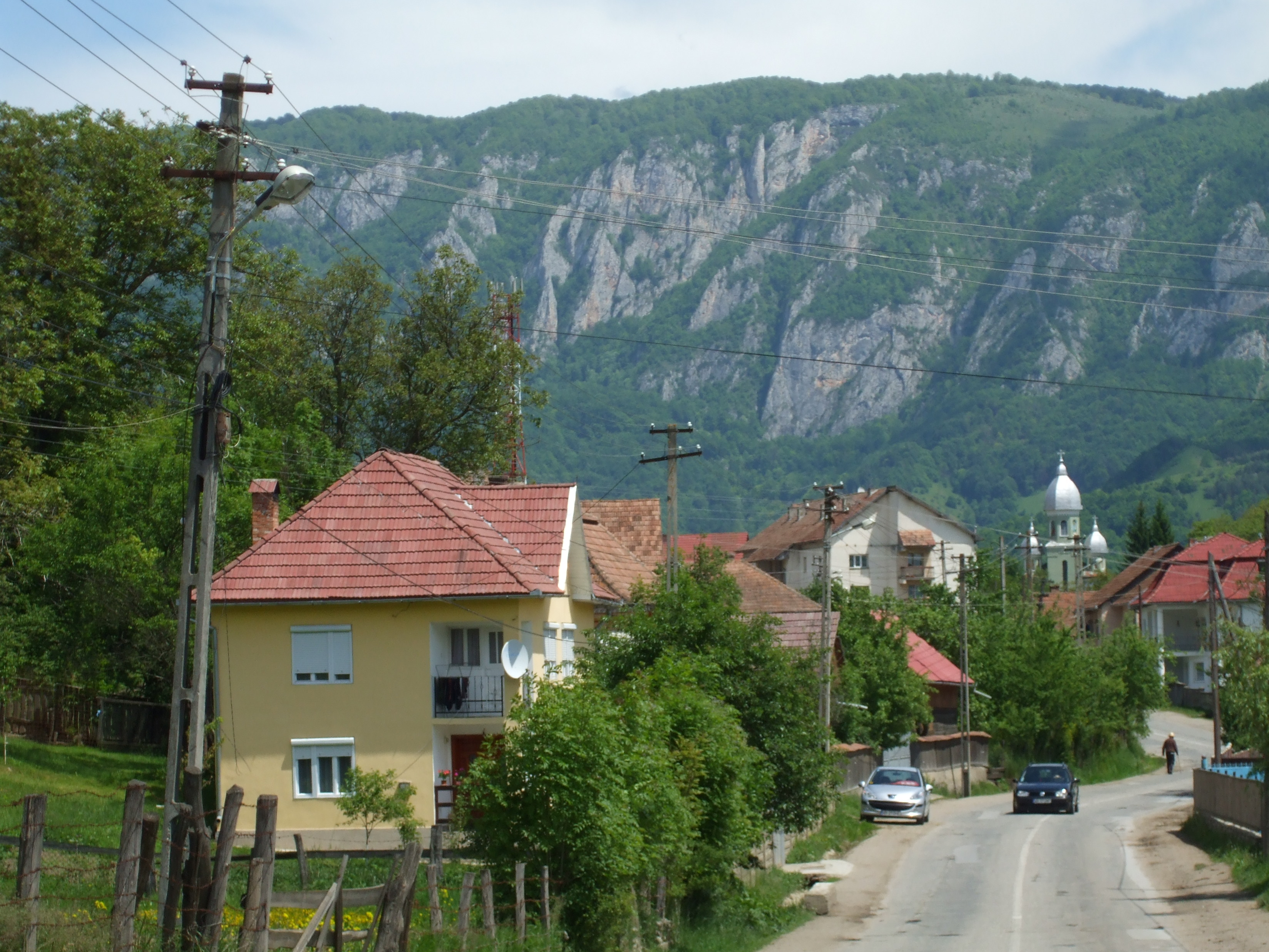 Vedere din Sălciua, jud.Alba